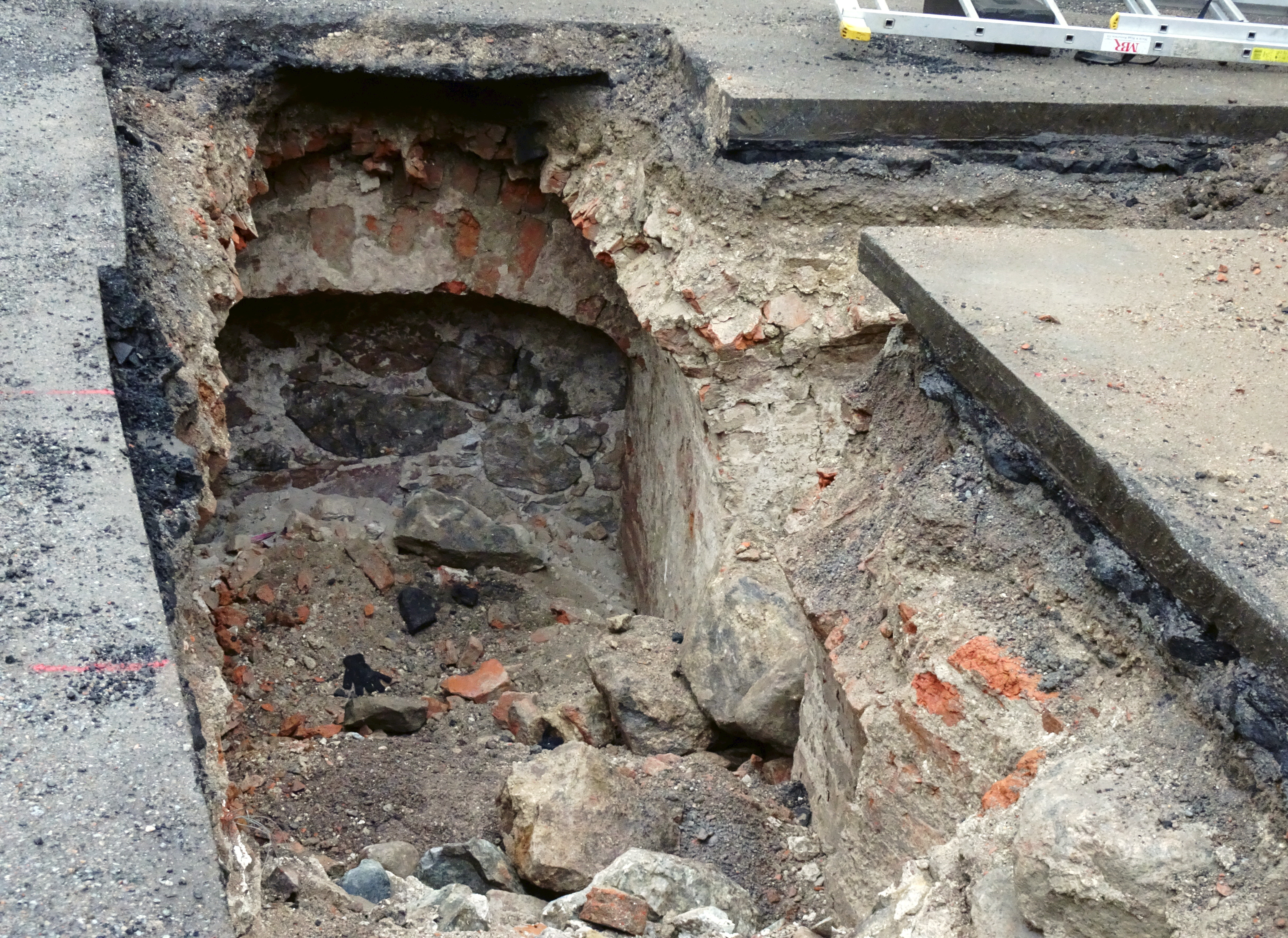 Storkyrkoskolans skolgård, arkeologisk utgrävning, rester efter Svartbrödraklostret